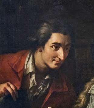 Particolare dell'Autoritratto con due studenti di Francesco Maggiotto con l'immagine del pittore Antonio Florian